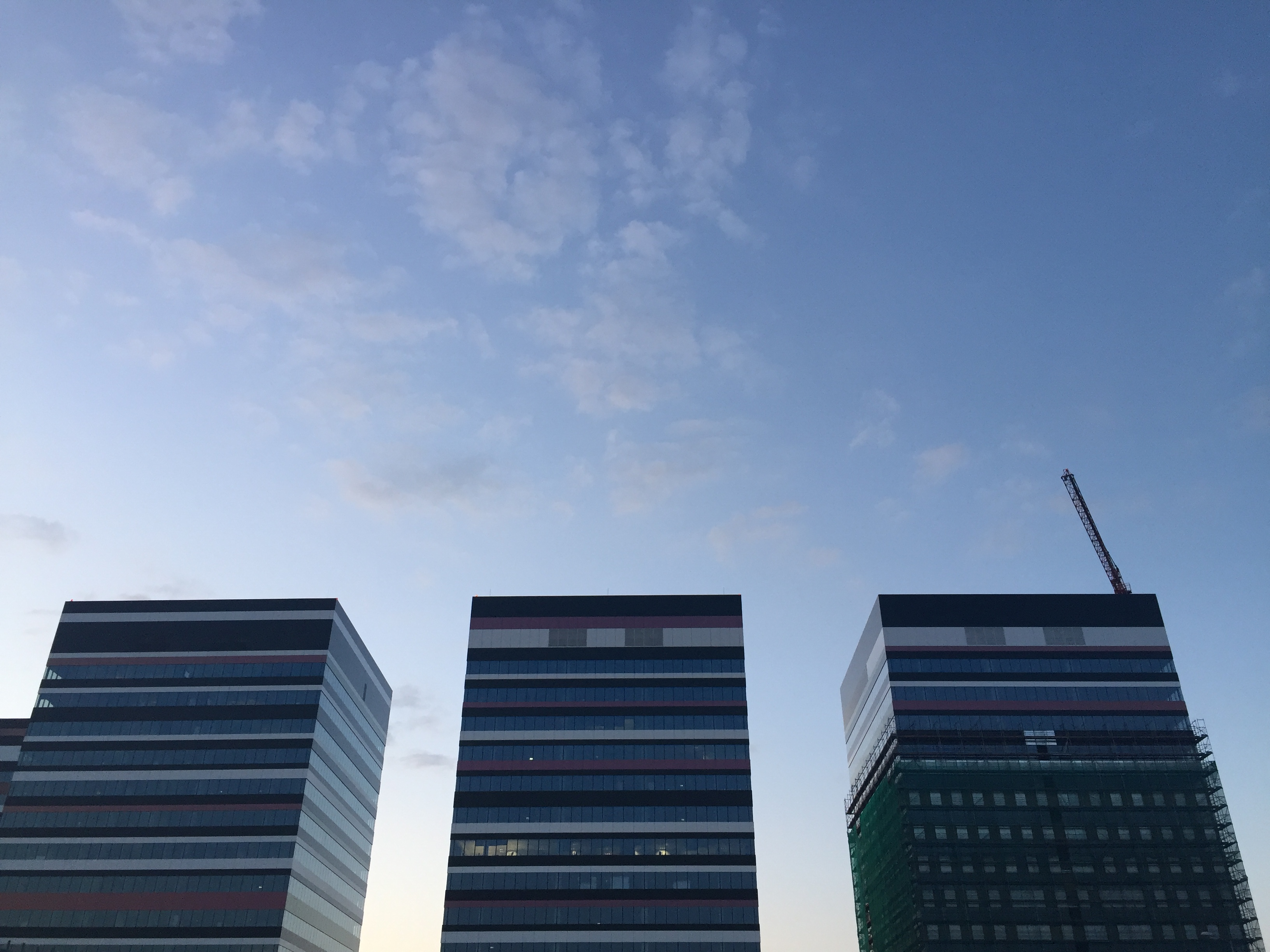 Miejsce: Silesia Business Centre w Katowicach. autor: Paulina Binias